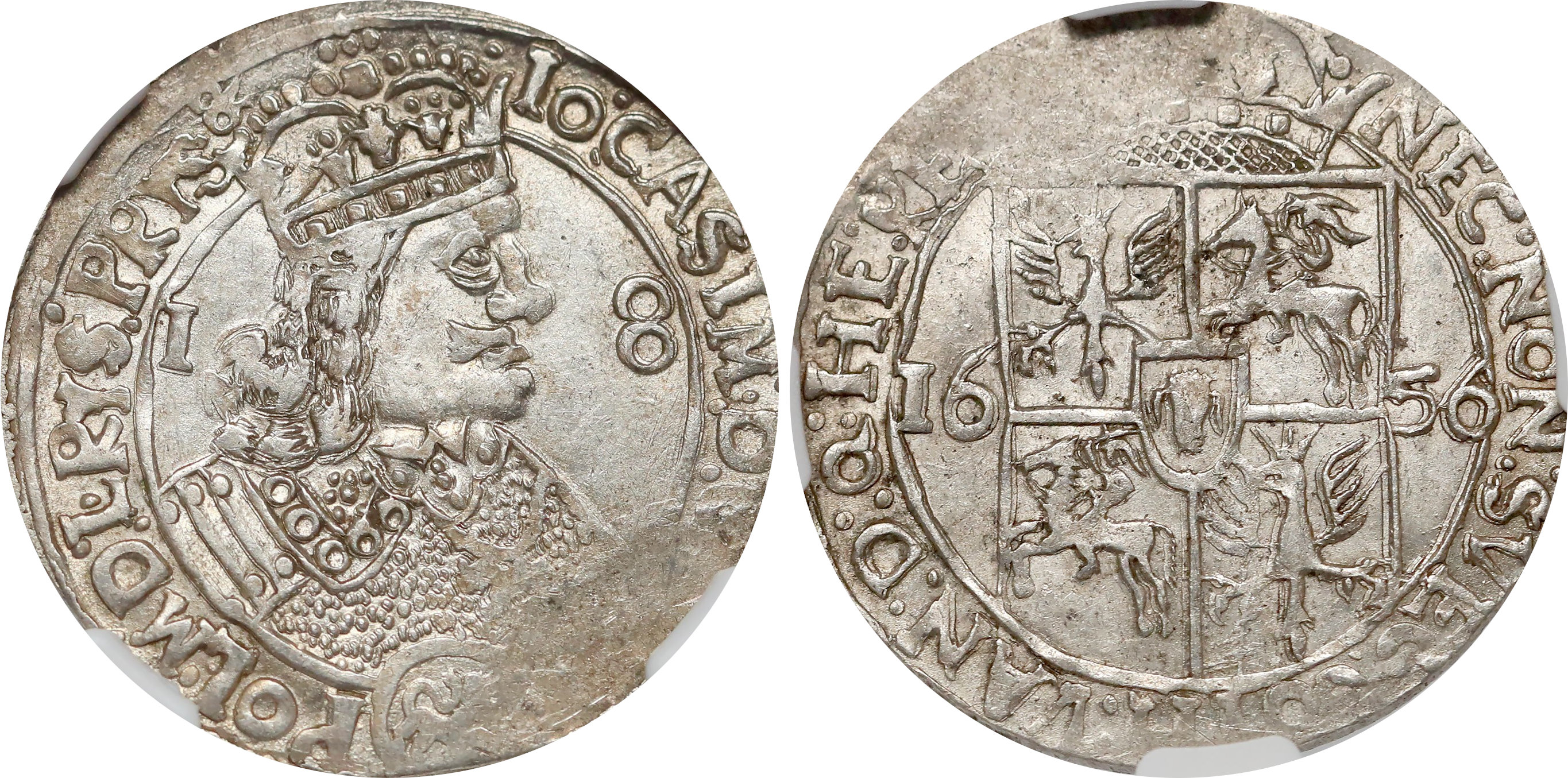 Ort koronny 1656 Lwów